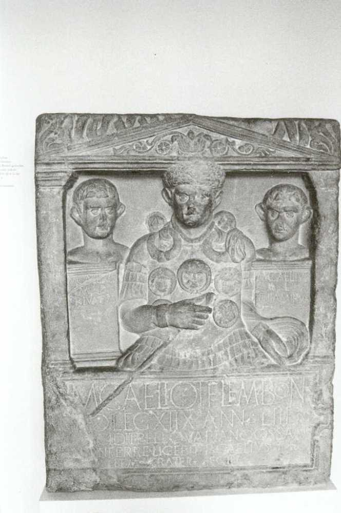 Der Grabstein des Marcus Caelius, Rheinisches Landesmuseum, Bonn